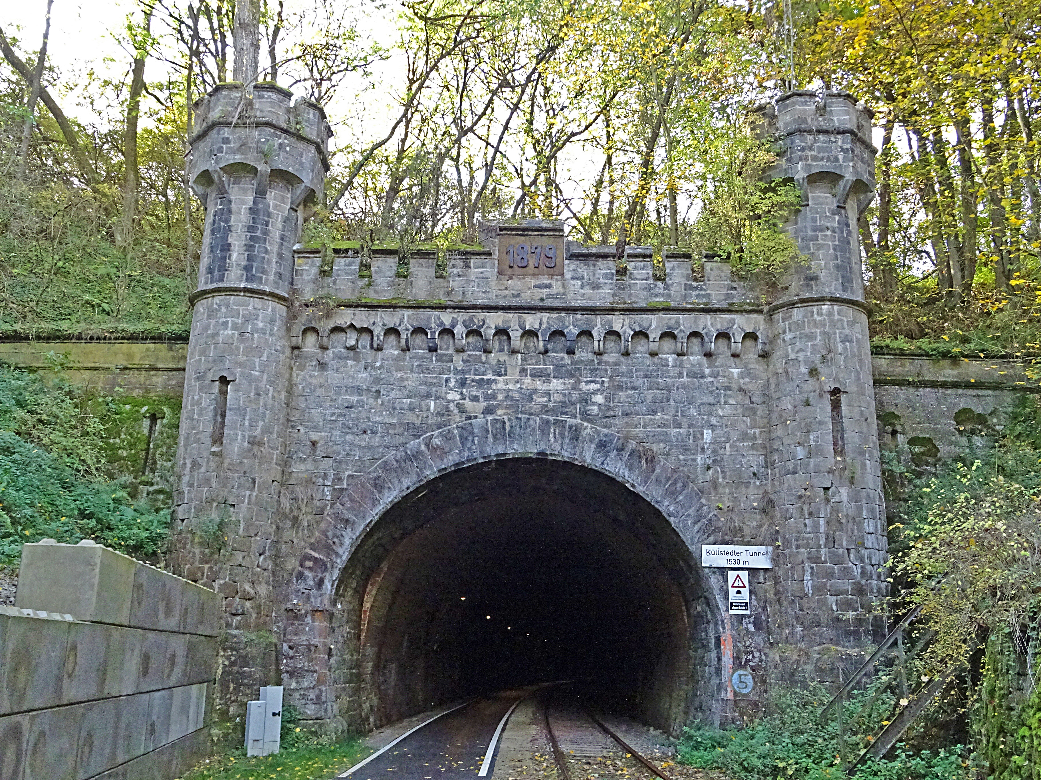 Ostportal Küllstedter Tunnel 1530 m von 1879